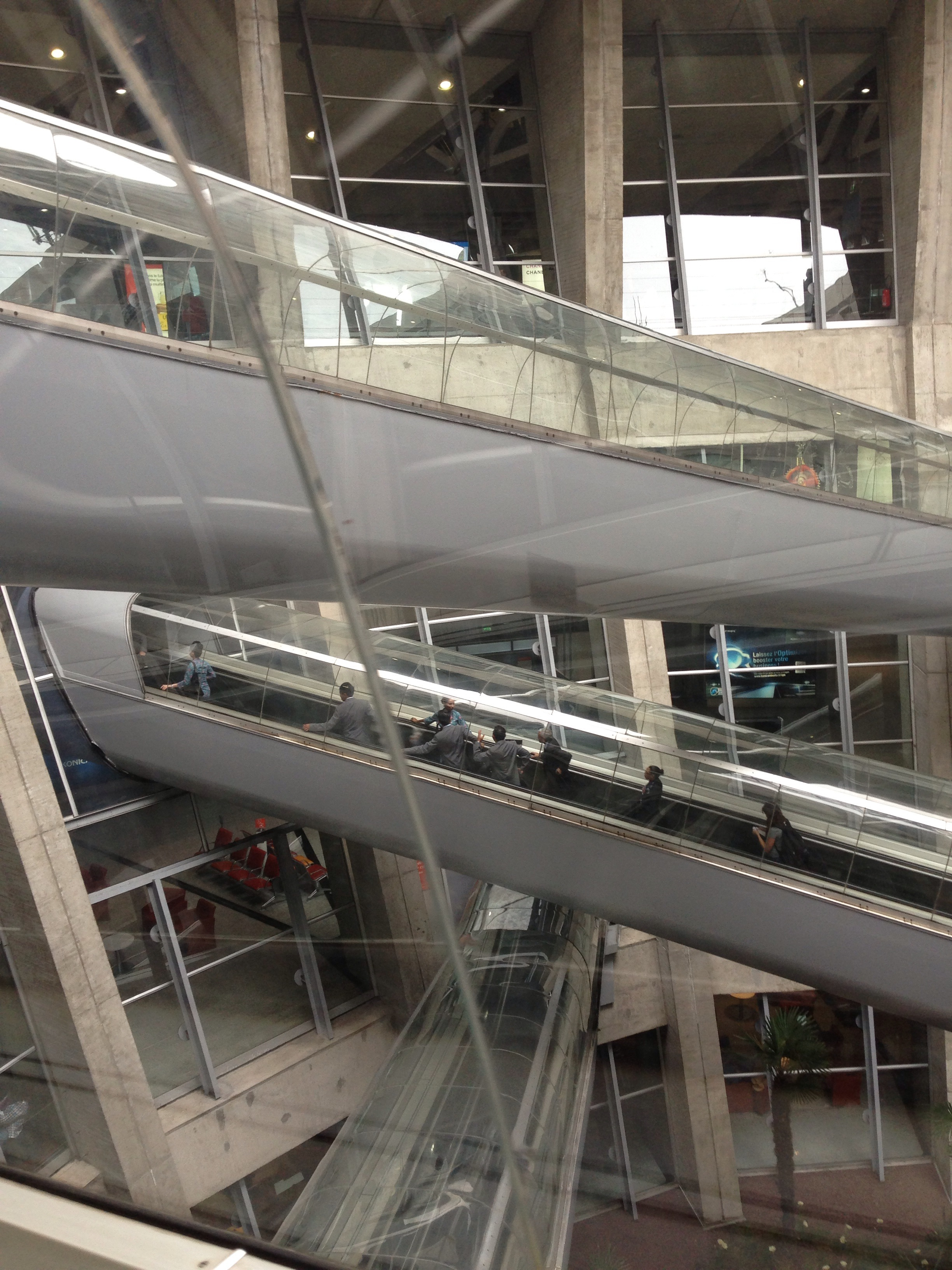 Escalators du patio central du terminal 1 de l'aéroport de Roissy-Charles-de-Gaulle, France.